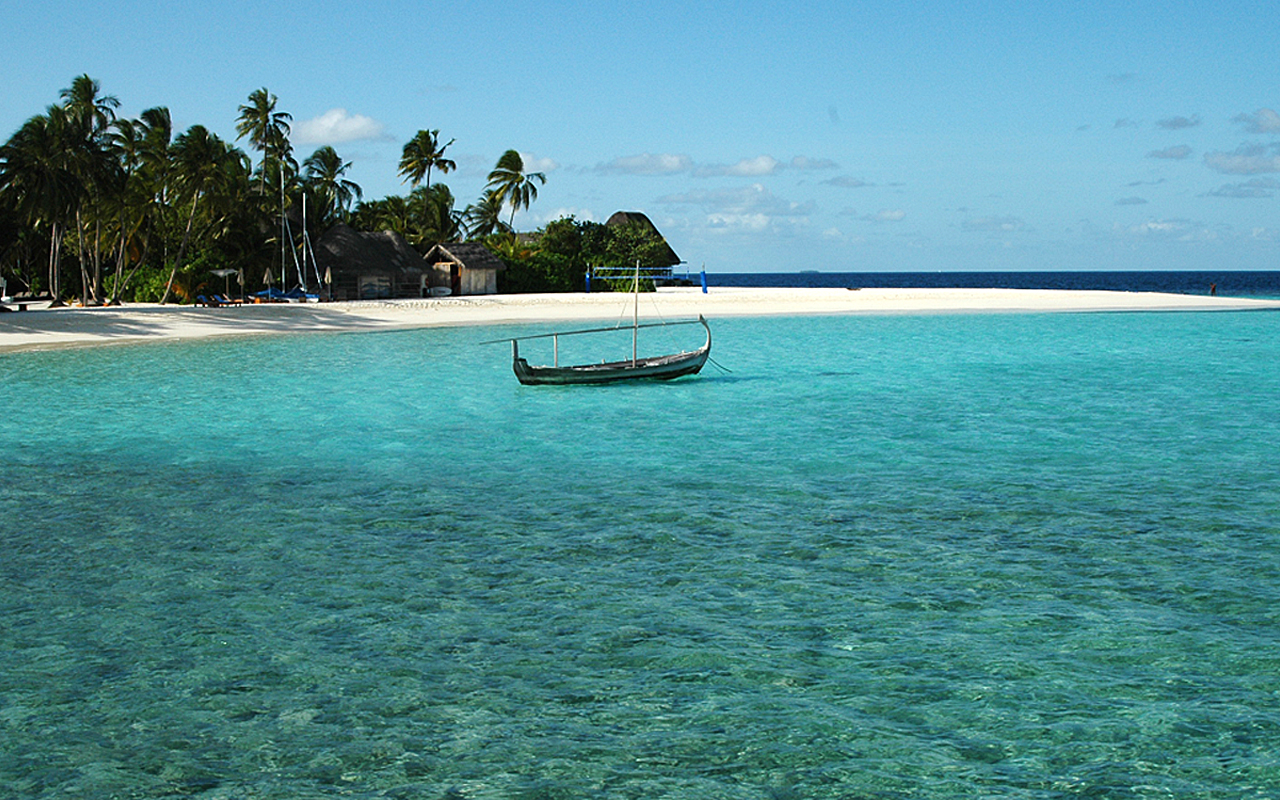 Hawai